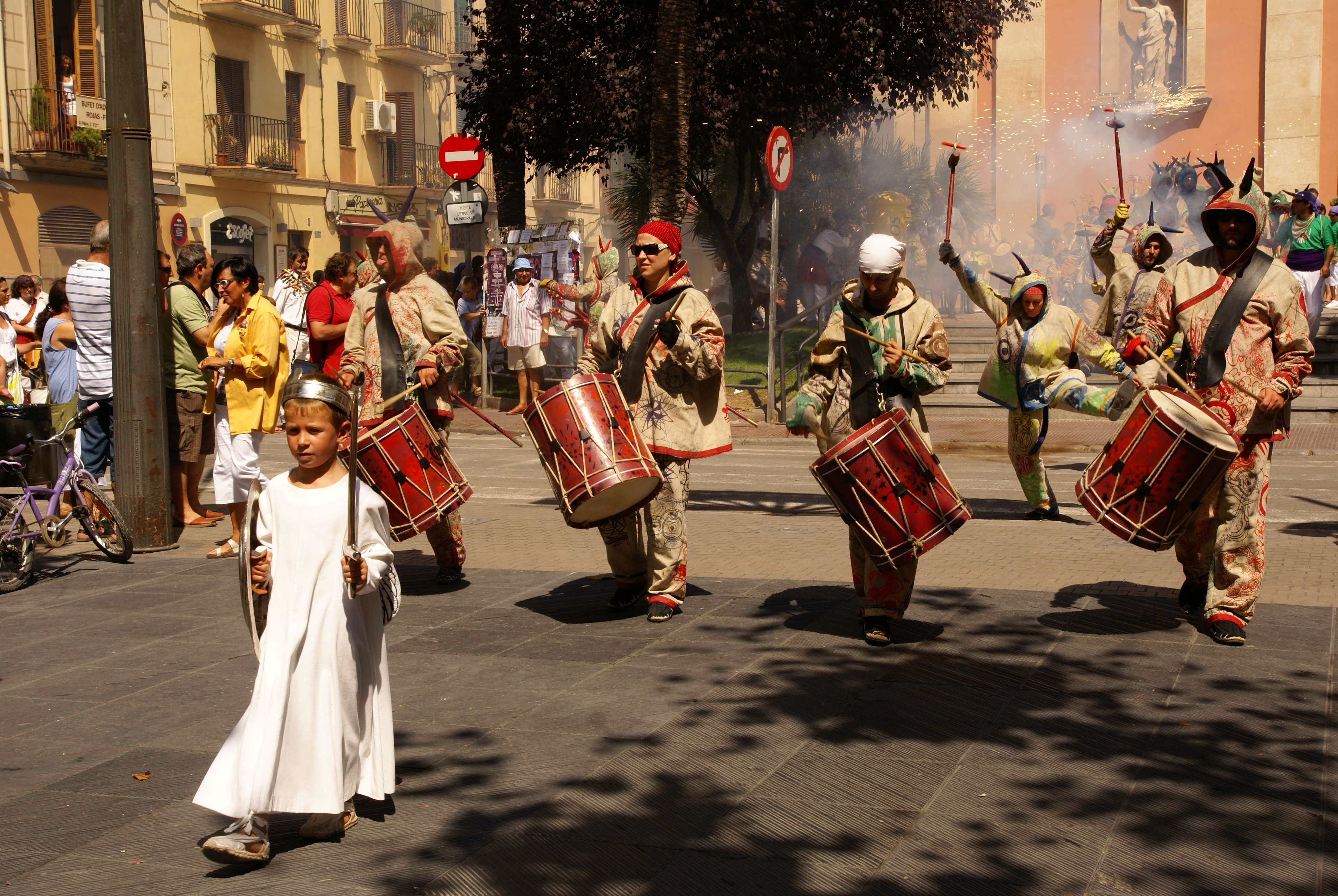 Cercavila de sortida d'Ofici, Festa Major de Vilanova i la Geltrú.